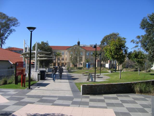 Bilde fra QUTs campus på Kelvin Grove. Fotograf: Bruker:Siljelb